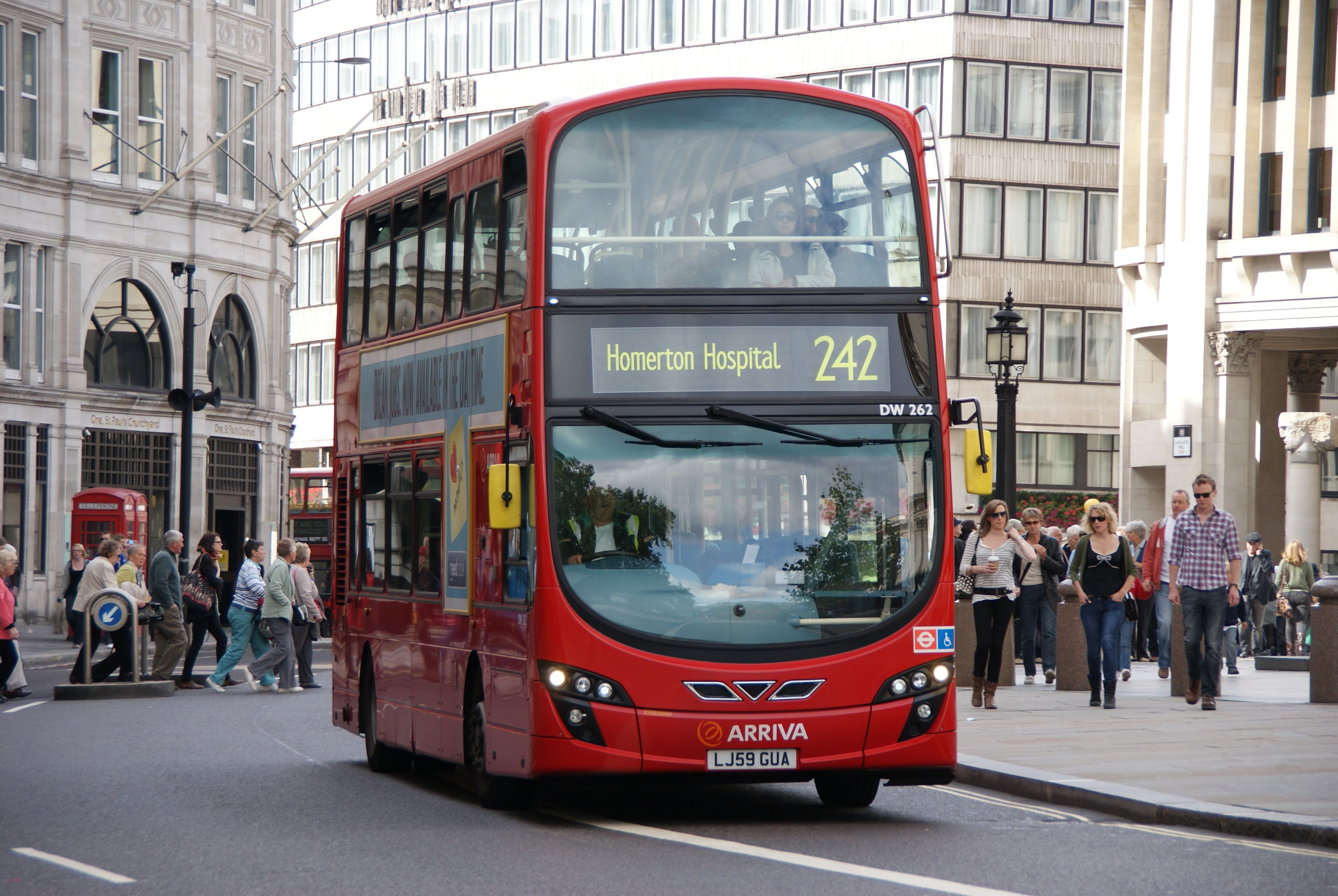 LJ59GUA 180910 CPS